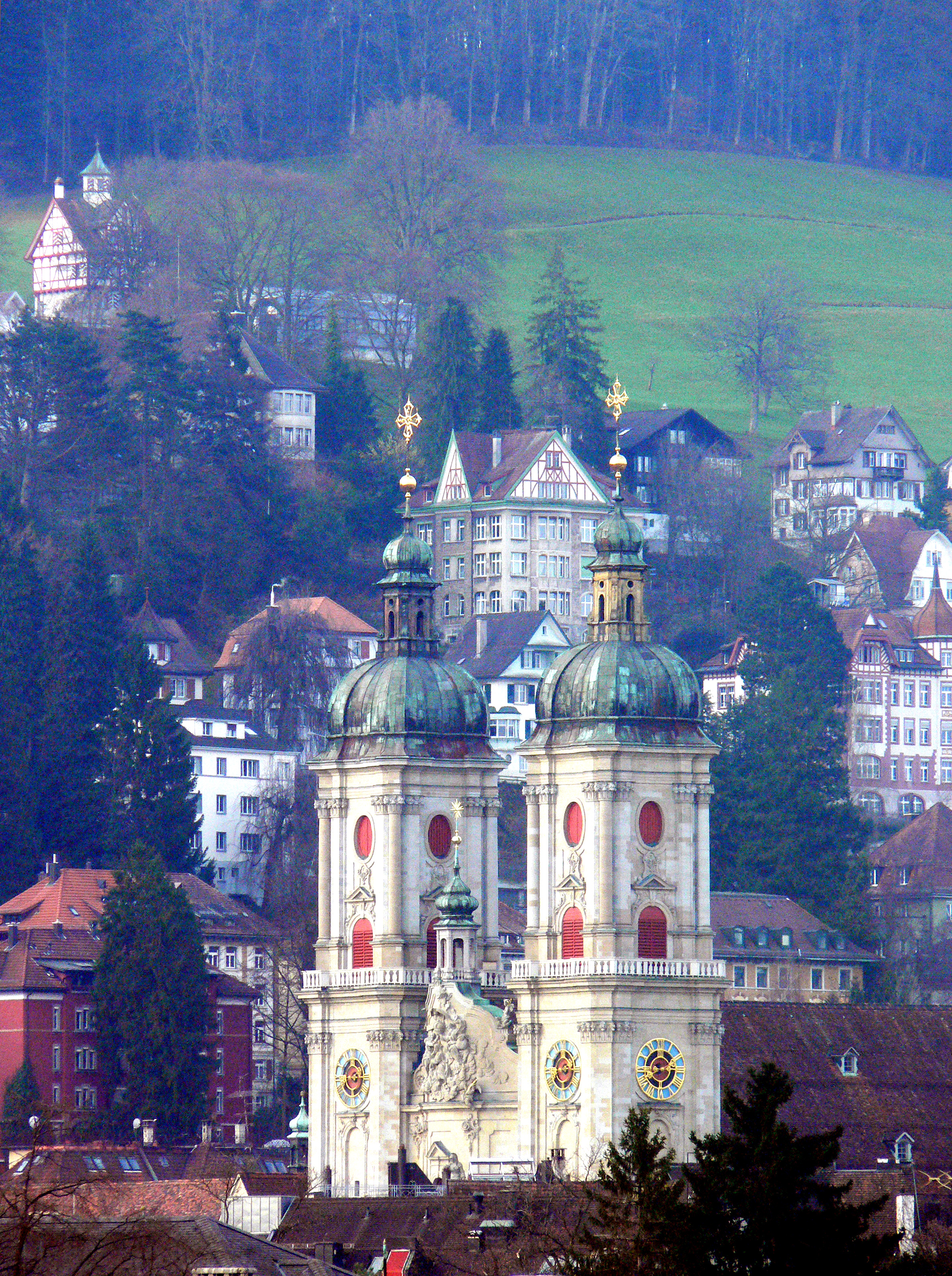 Die Türme der Stiftskirche St. Gallus und Othmar, Kathedrale des Bistums St. Gallen